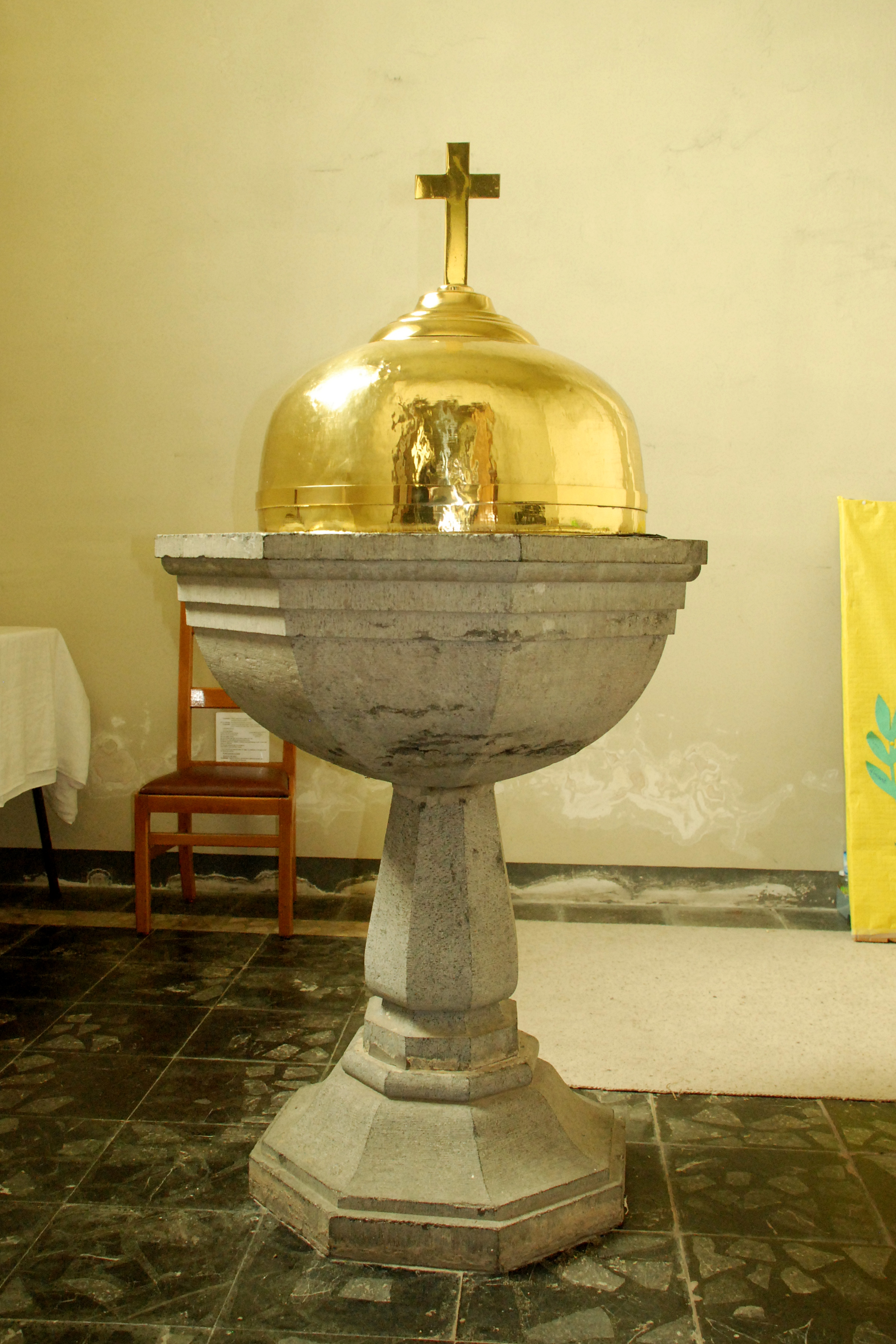 Belgique - Église Notre-Dame de Mousty